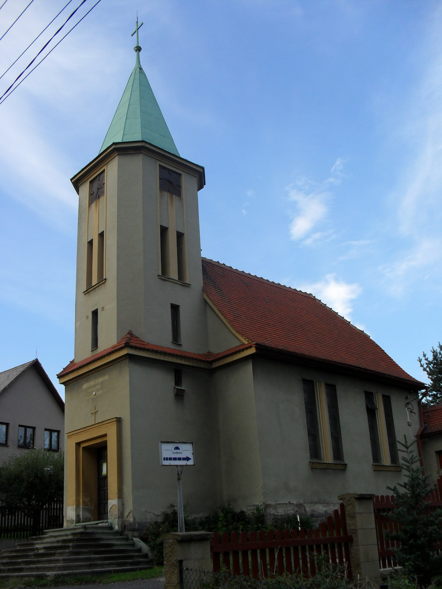 Kostel Božího srdce Páně v liberecké části Machnín.